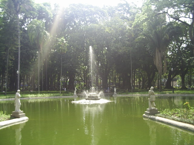 Fonte do Jardim da Luz, Bom Retiro, São Paulo, SP, Brasil.